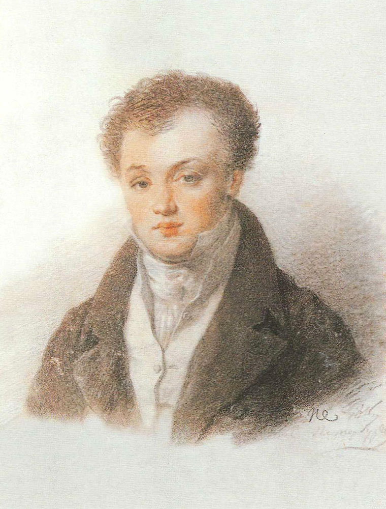 Дмитрий Николаевич Блудов (1785-1864)